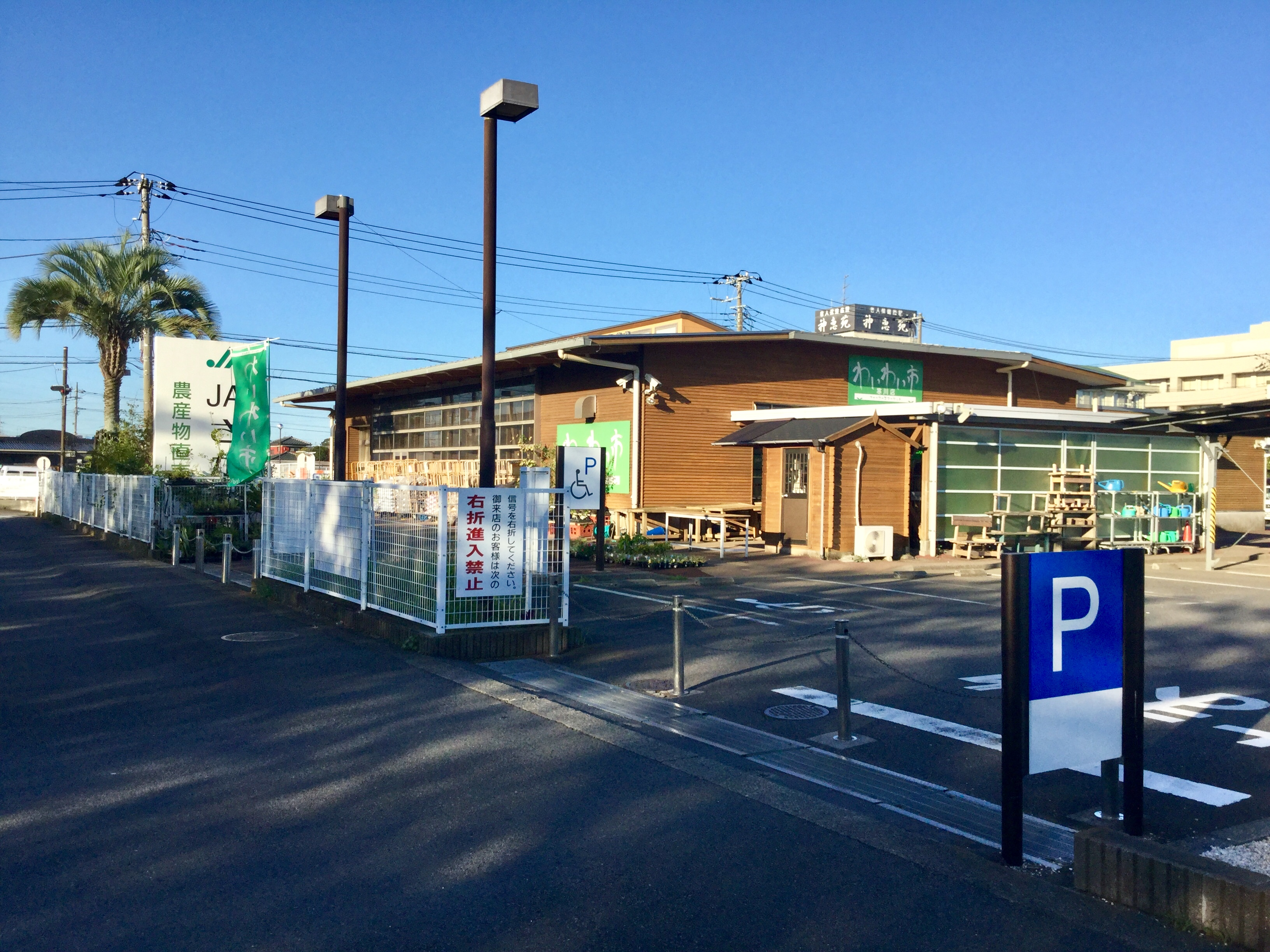 神奈川県にある農産物直売所「わいわい市 寒川店」